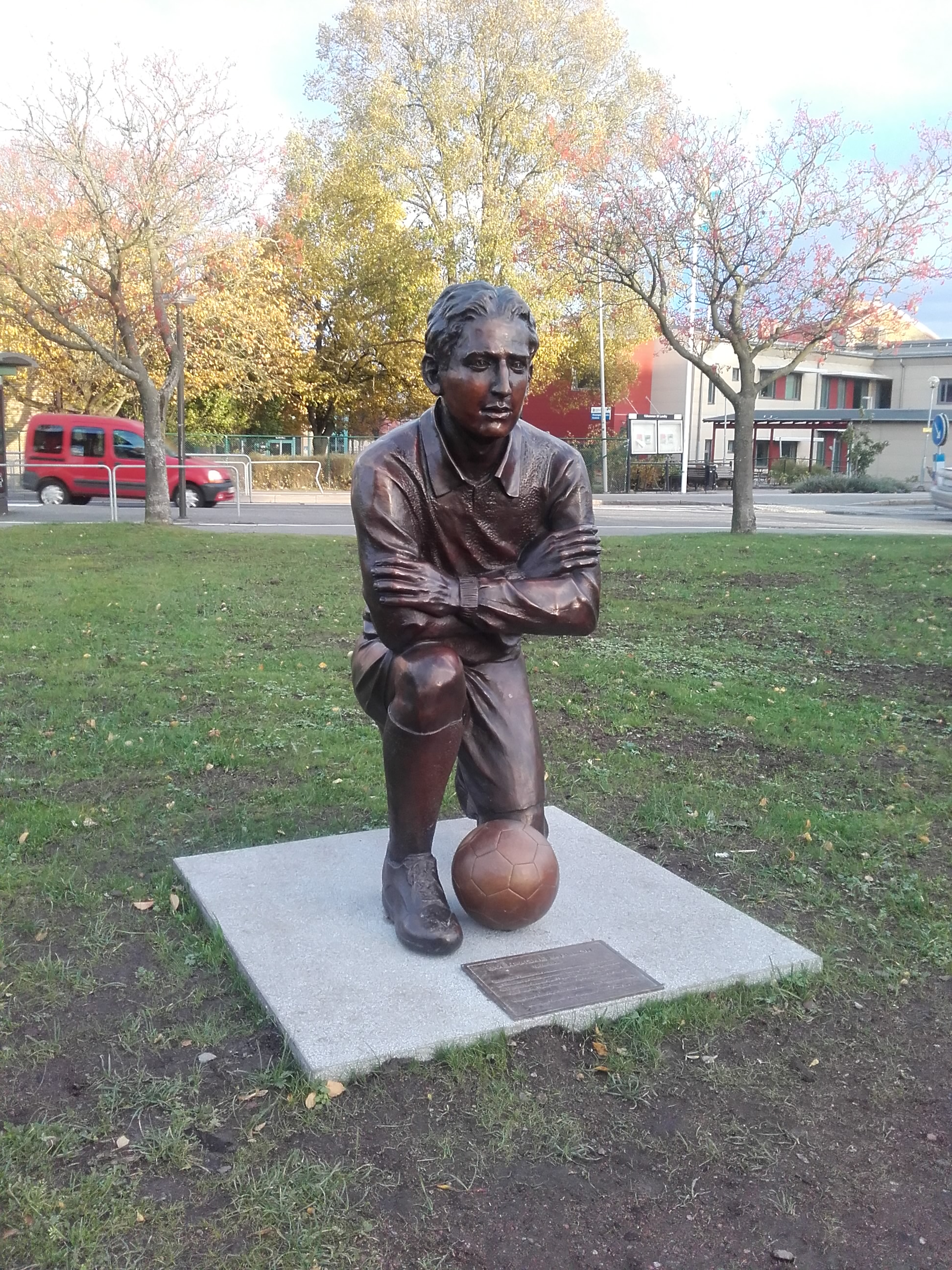 Den svenska fotbollsspelaren Sven-Agne Larsson som staty vid vägen som bär hans namn i Göteborg.